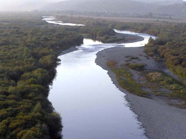 Галицький національний природний парк: Галицький національний природний парк